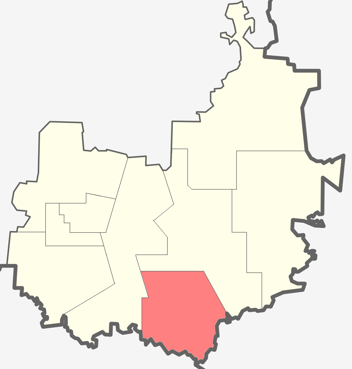 Климовское сельское поселение на карте Бокситогорского района Ленинградской области.